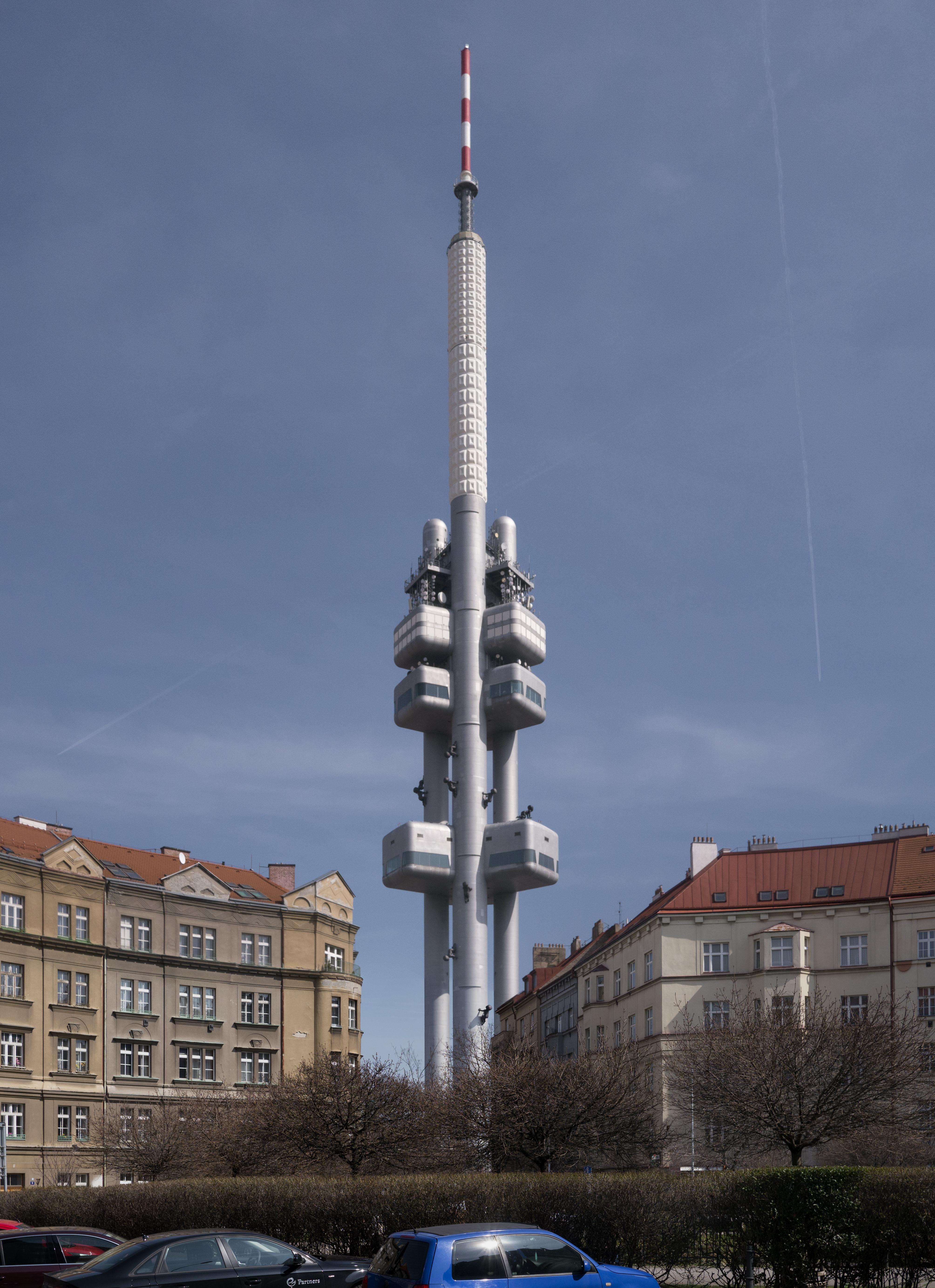 Prag Fernsehturm